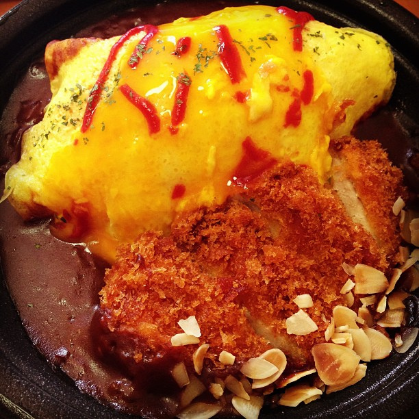 日本ボルガラー協会公認サークルKサンクスのボルガライスを食べるよ！